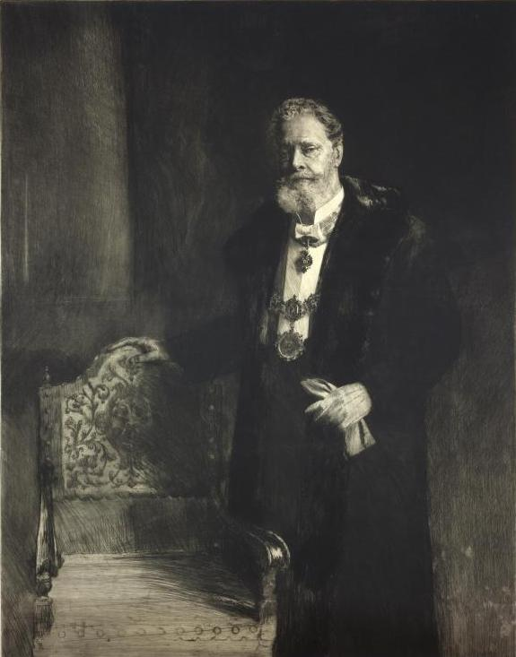 Karl Lueger (1844–1910)